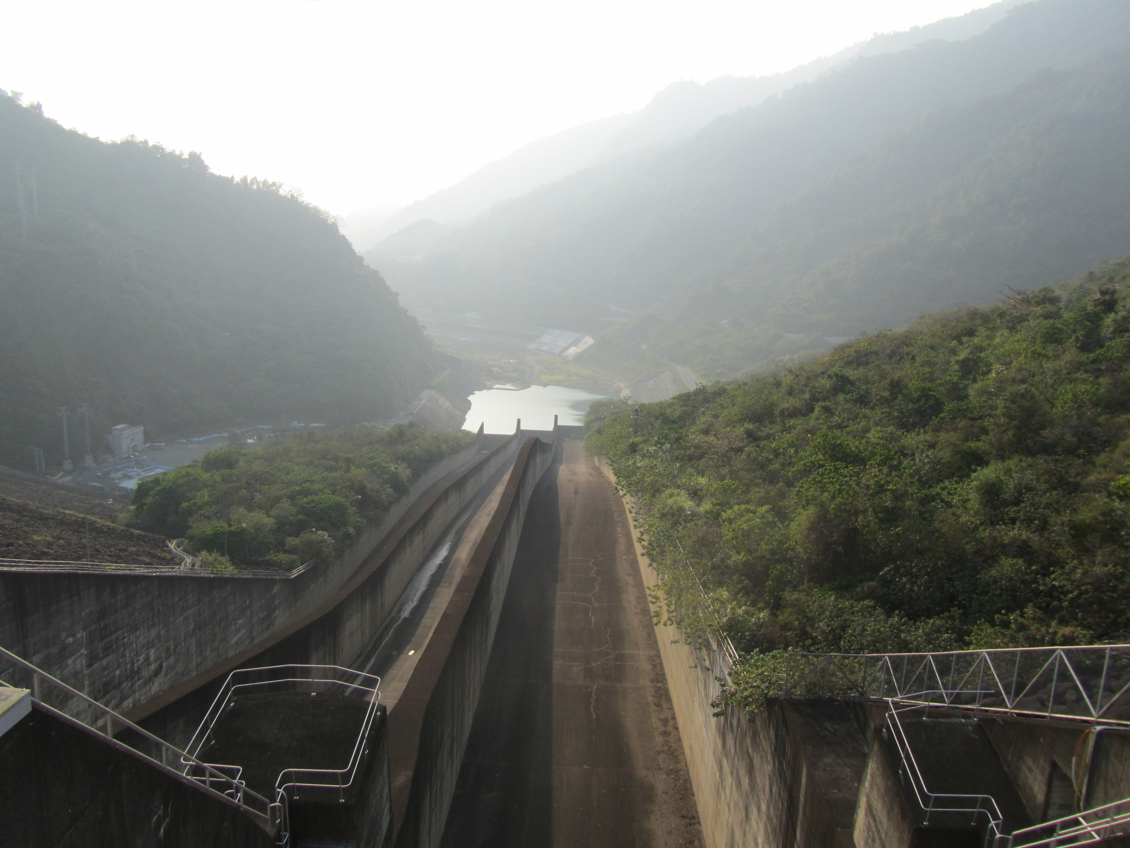 2012年1月30日，在曾文水庫溢洪道口上方。